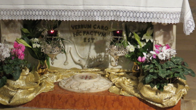 Basilica of the Annunciation, Nazareth, Israel